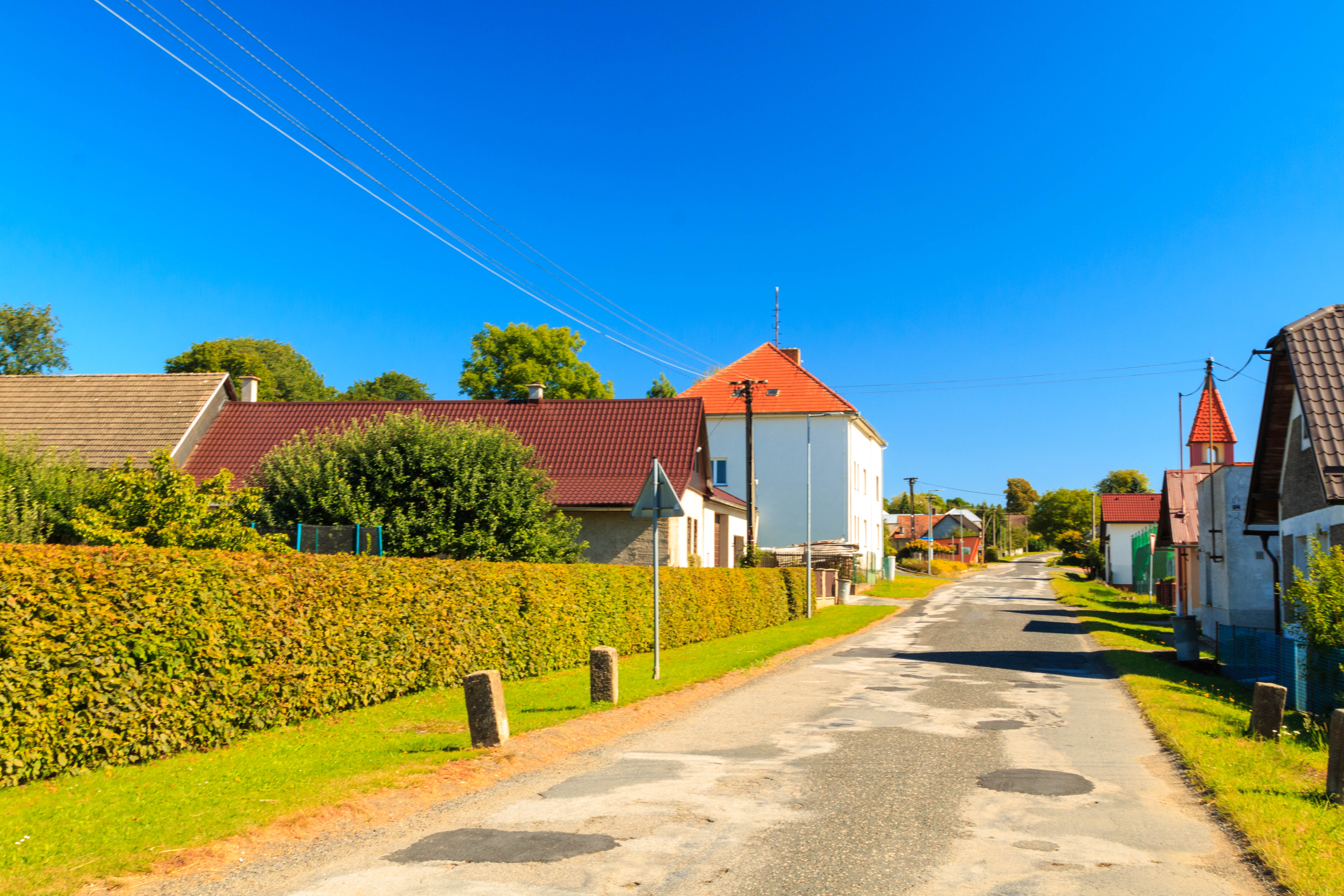 Bělá u Bohdanče - čp. 39